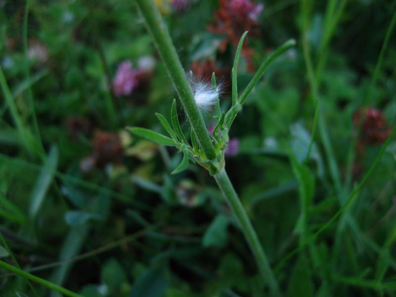 Blatt der Acker-Witwenblume Knautia arvensis